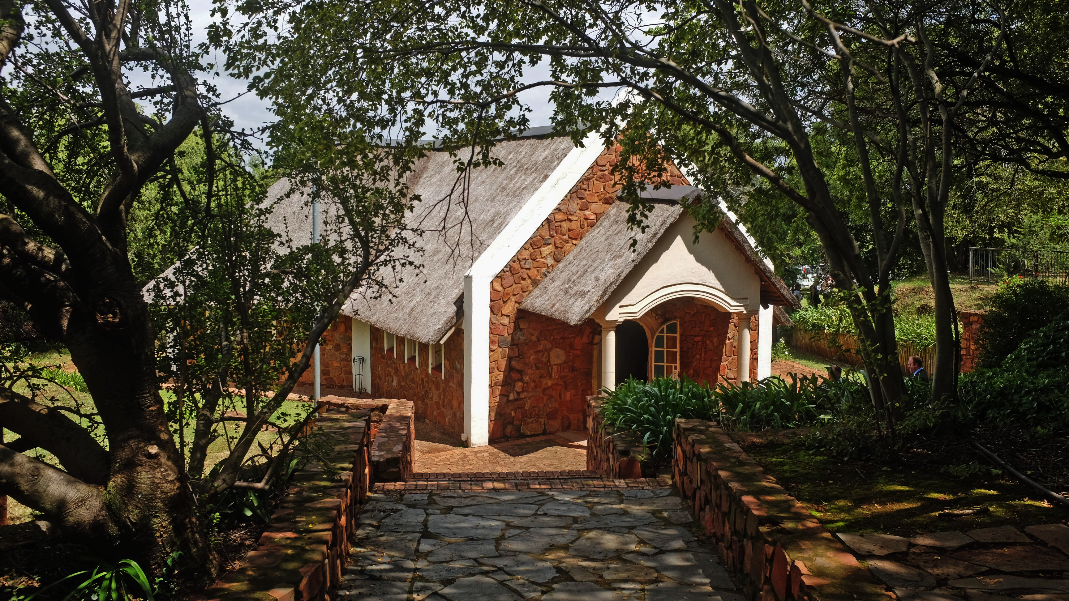 Voortrekker Monument Chapel